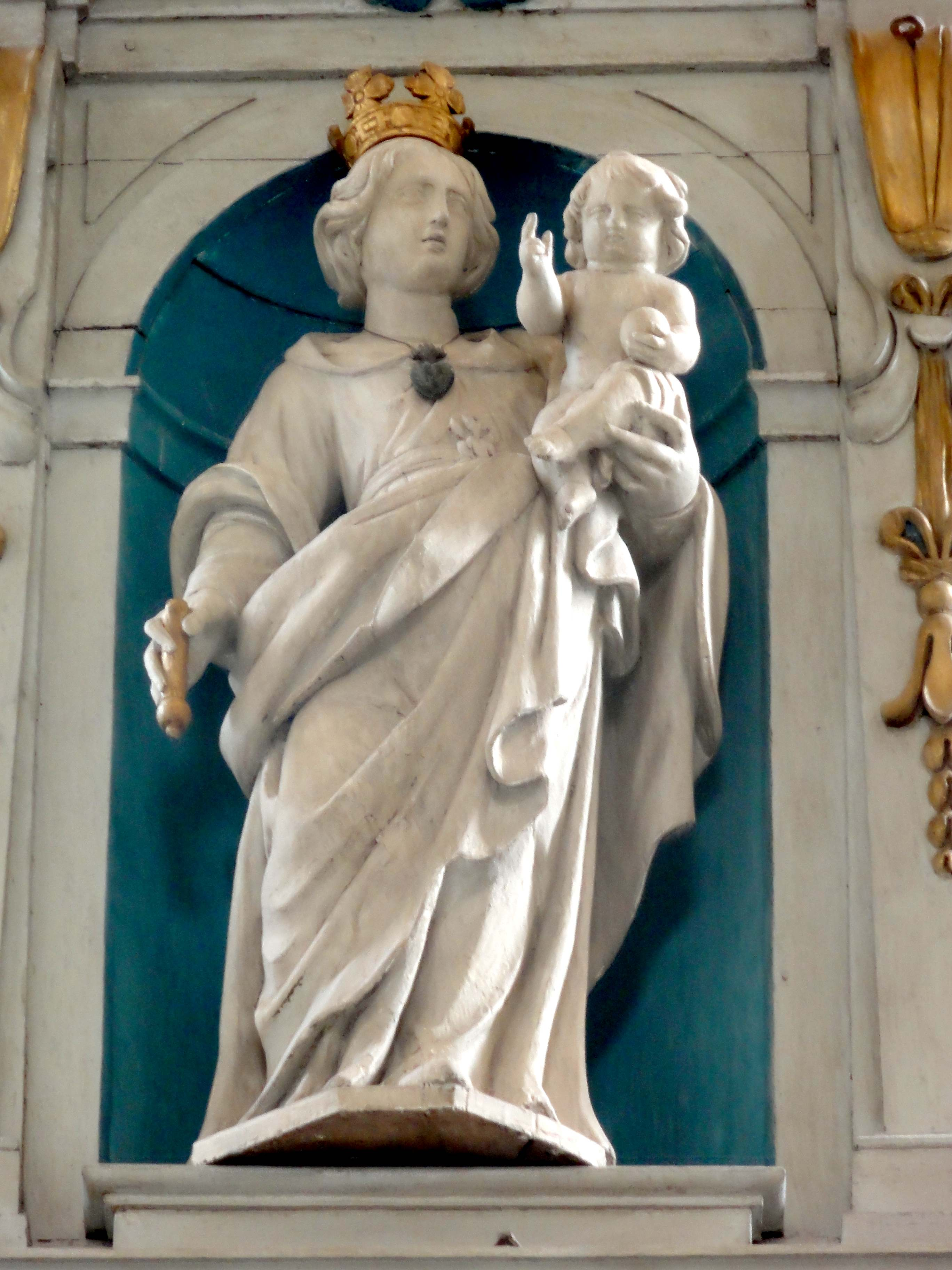 Retable majeur, Vierge à l'Enfant.